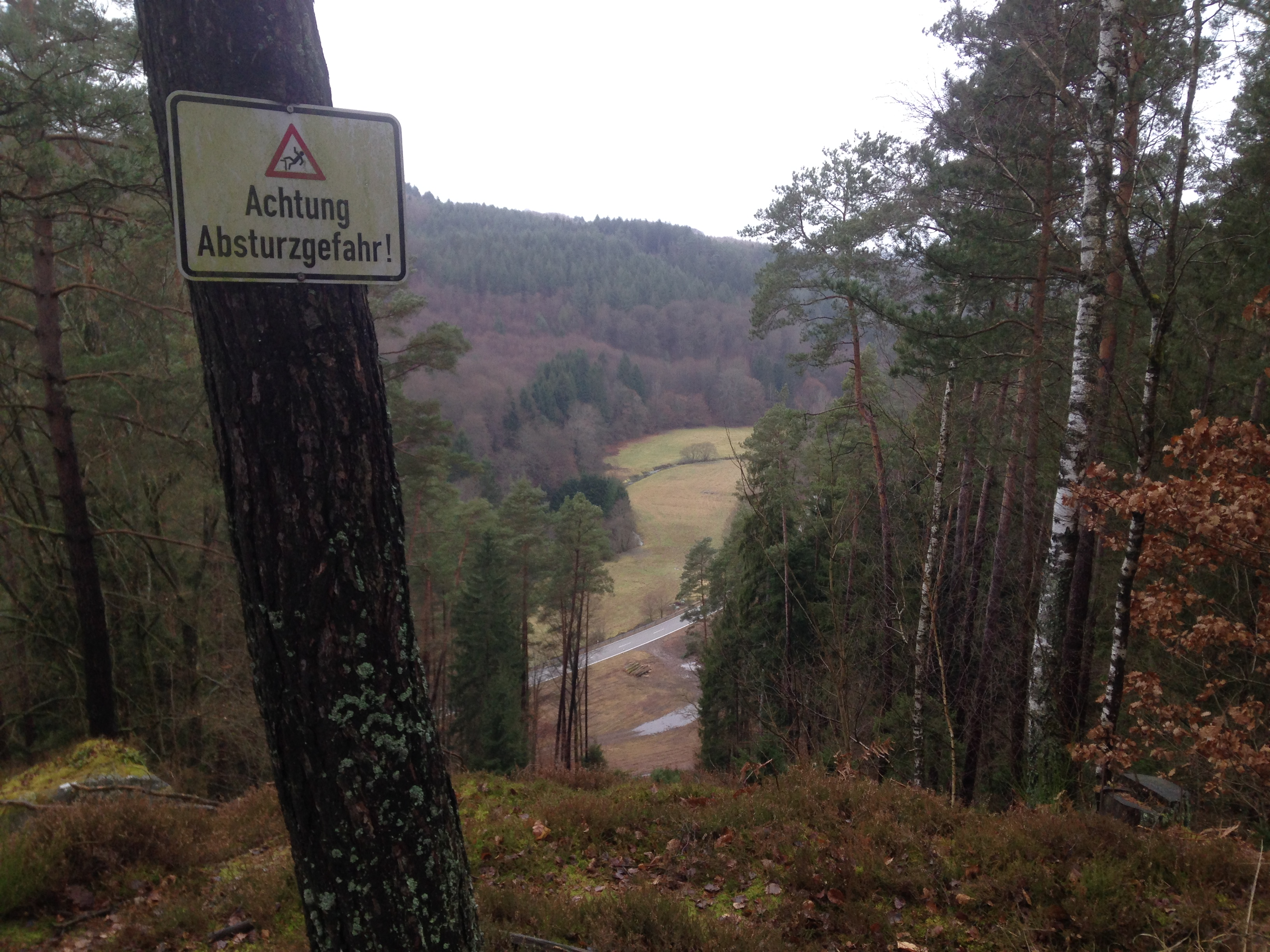 Aussichtspunkt der Heidelsburg mit Hinweistafel